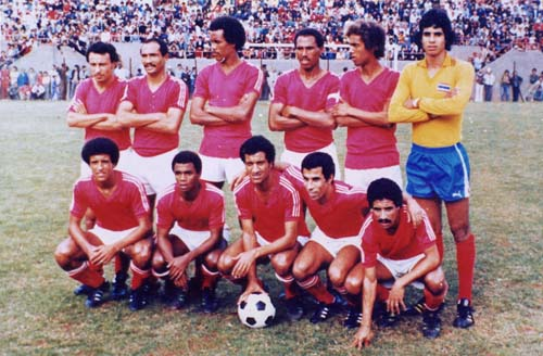 L'équipe du Wydad de Casablanca en 1978